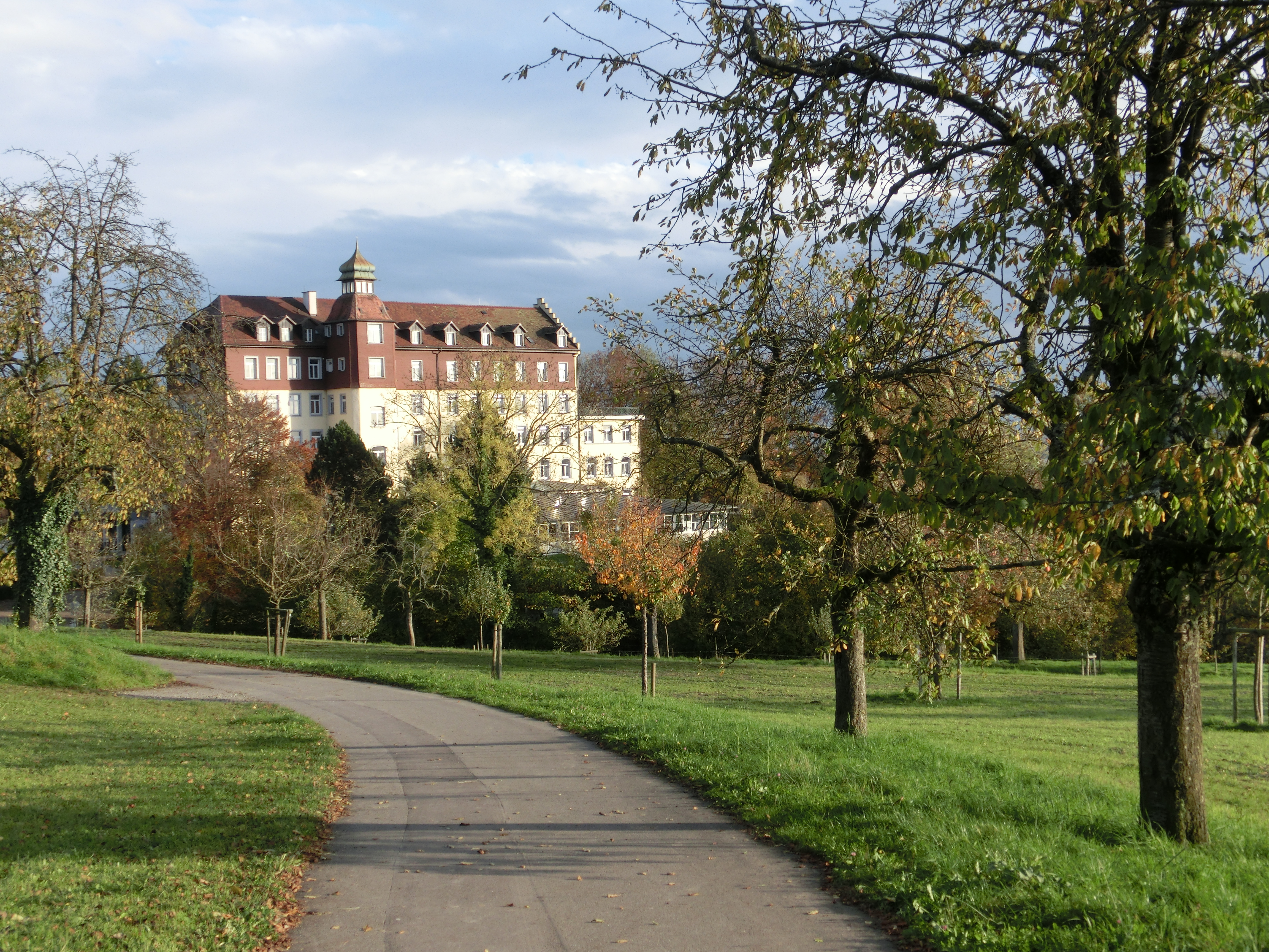 Deutschland - Baden-Württemberg - Bodenseekreis - Überlingen: Schloss Spetzgart